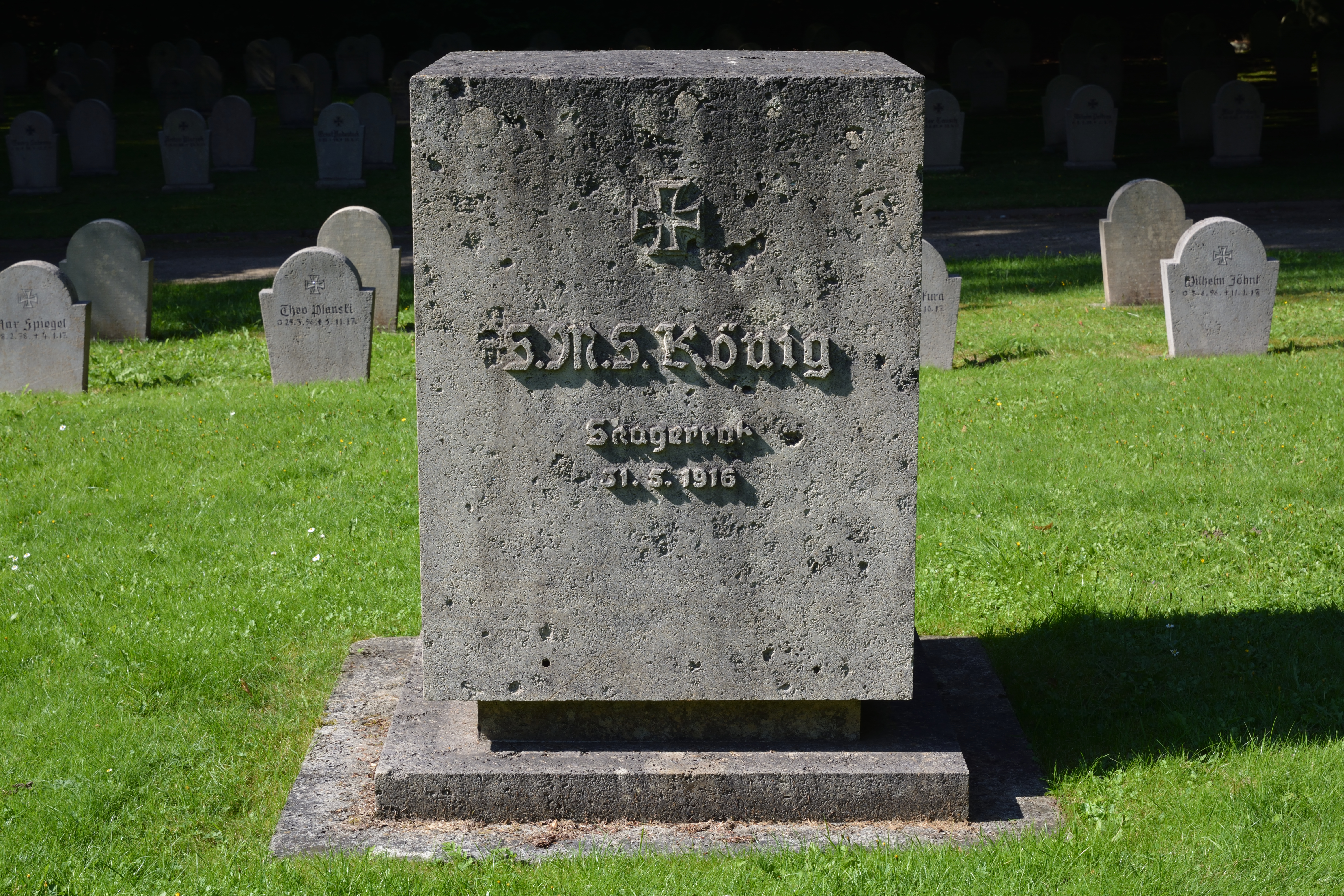 Impressionen aus dem Nordfriedhof in Kiel Ein Grossteil diese Friehofes ist den Gefallenen der beiden Weltkrige gewidmet.